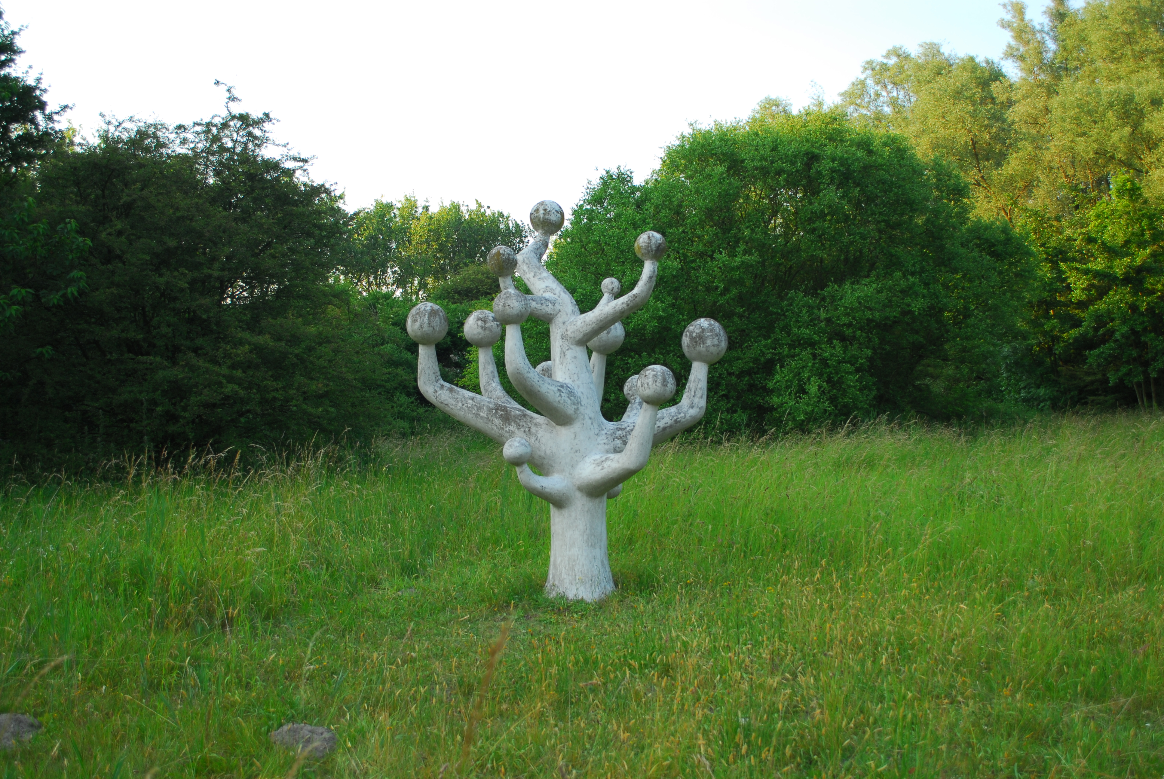 Nieuw Meer, Sculpture